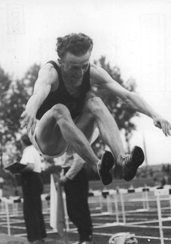 Hübschmann Zentralbild Erfurt-Wlocka Bey-Sch. 21.7.1956 VII. DDR-Leichtathletik-Meisterschaften in Erfurt. In der Zeit vom 20.7. bis zum 22.7.1956 finden in Erfurt die VII. Leichtathletikmeisterschaften der DDR in der Staffel- und Einzelwettbewerben der Männer und Frauen statt. UBz: Hübschmann (Wismut Karl-Marx-Stadt) während des Weitsprunges der Herren.